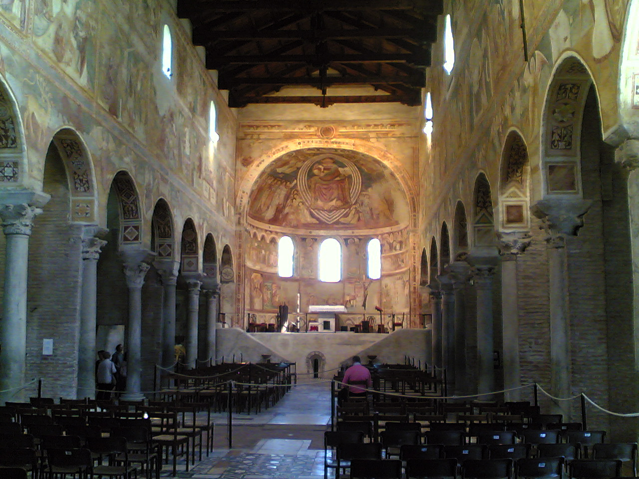 Abbazia di Pomposa (interno) - foto realizzata da Utente Microsoikos